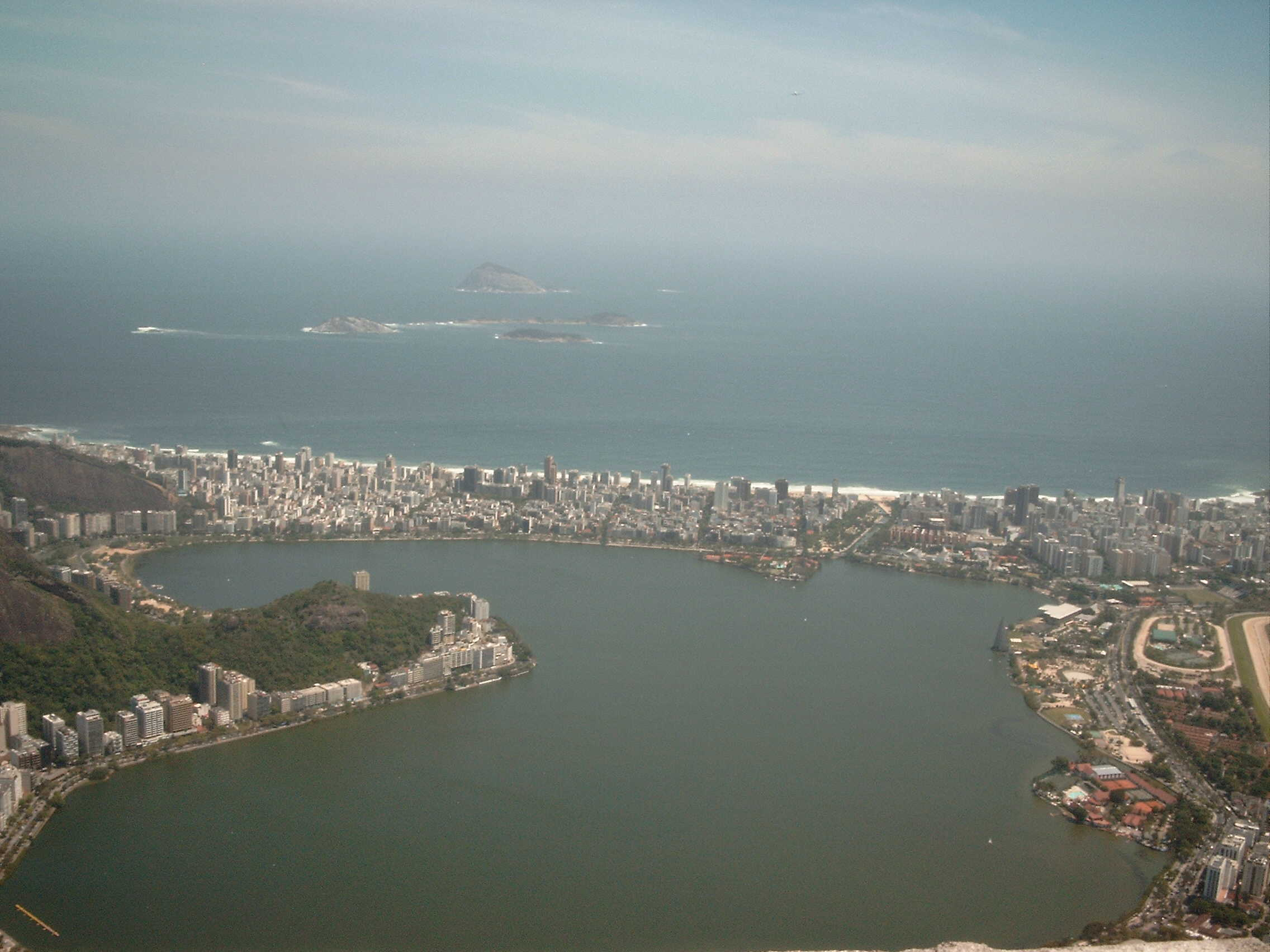 Ipanema vu du Corcovado